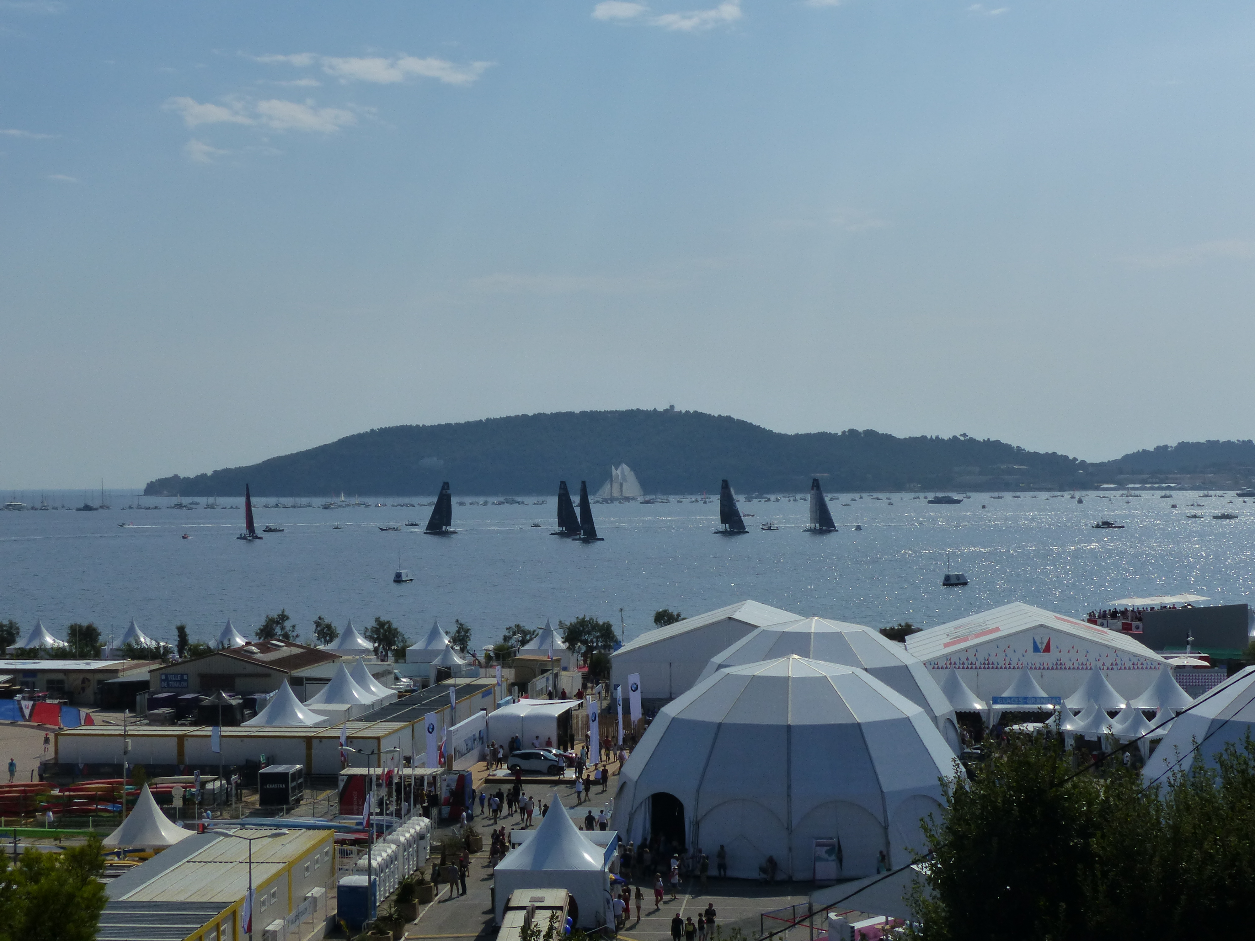 Vu sur la petite rade de Toulon utilisée comme plan d'eau lors de la Coupe de l'America à Toulon le 11 septembre 2016